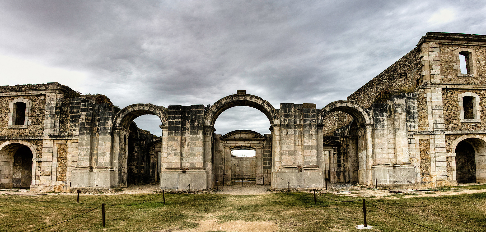 Panoràmica de l'església inacabada de l'interior de la fortalesa de Sant Ferran de Figueres.